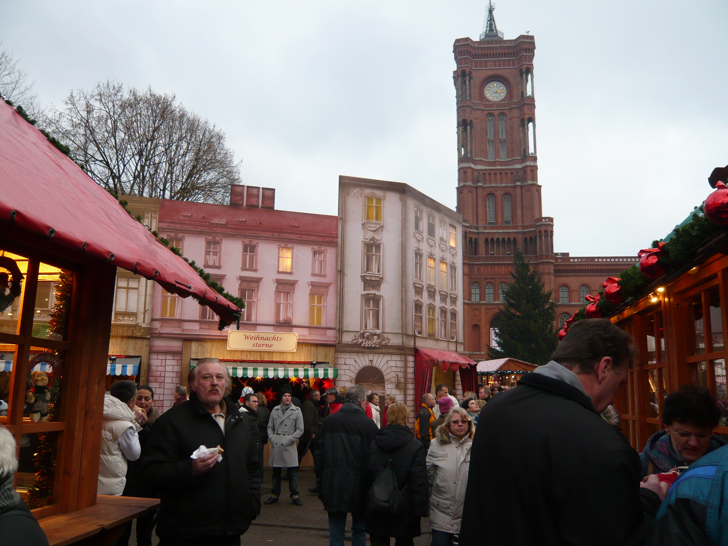 Berliner Weihnachtsmarkt am Roten Rathaus 2008